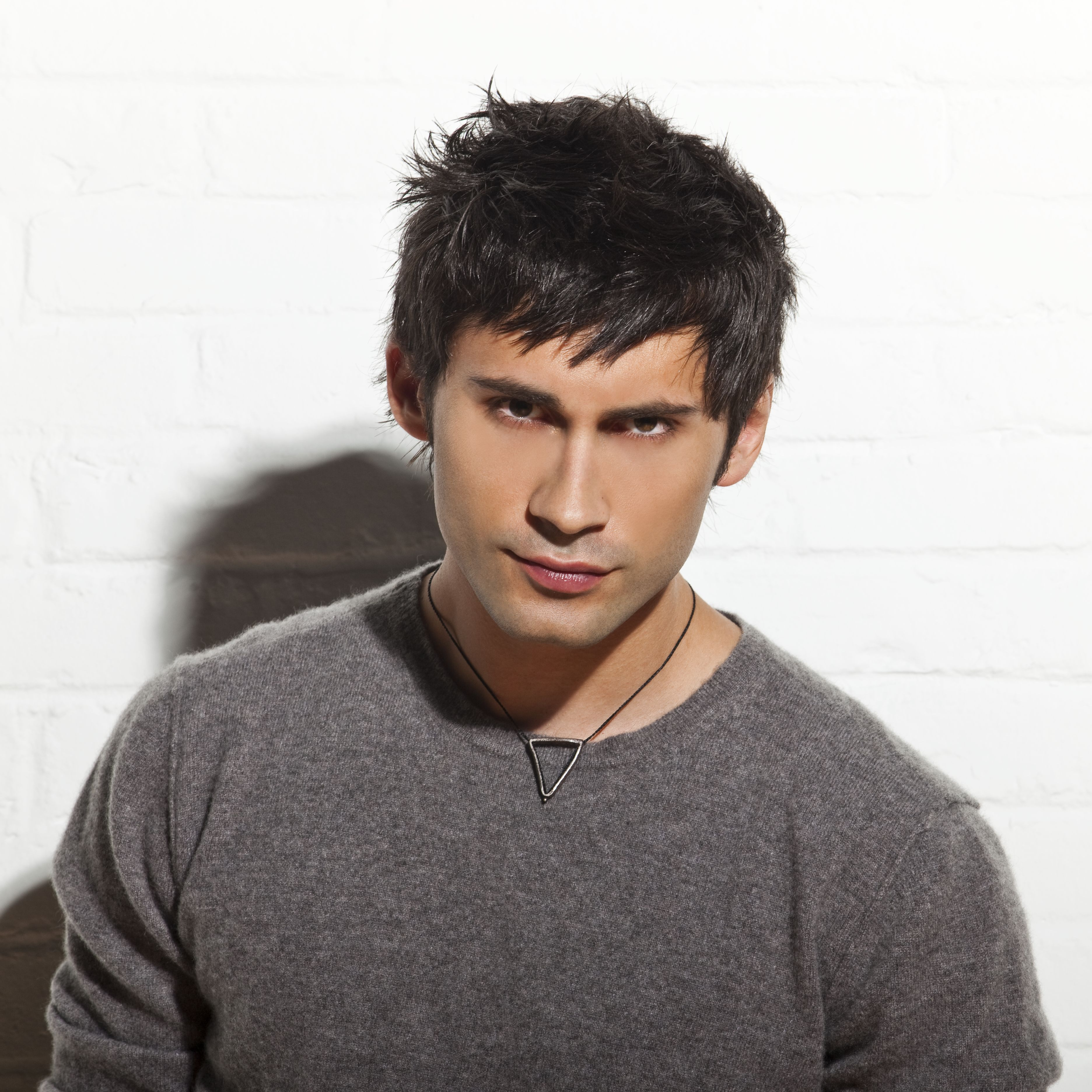 Dan Balan